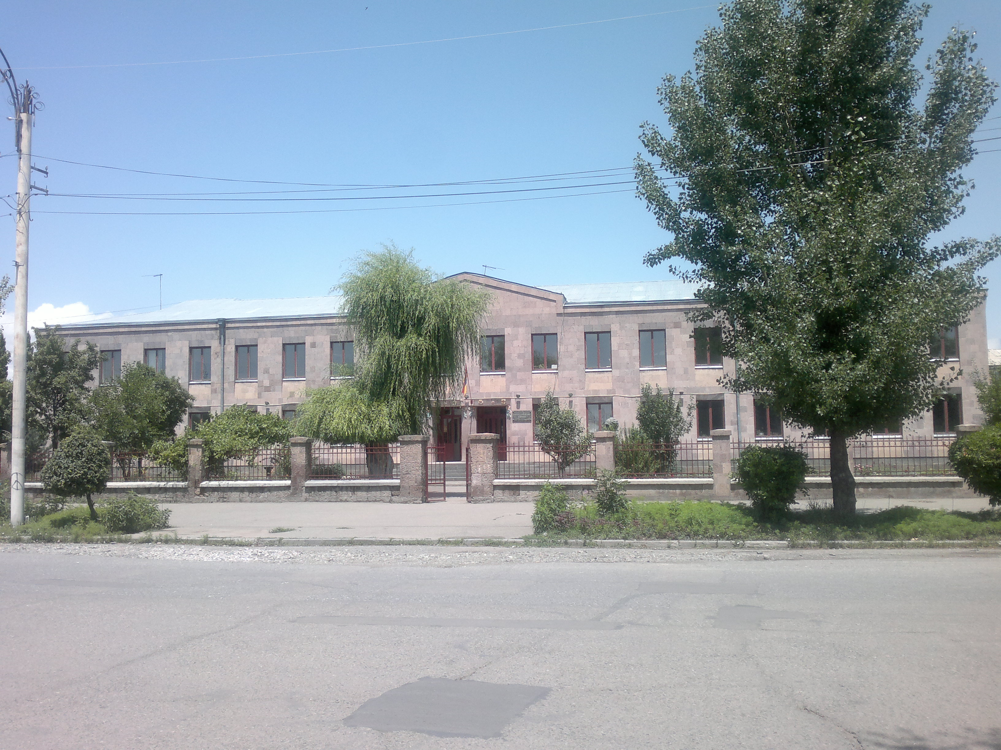 Գյումրու թիվ 26 դպրոց